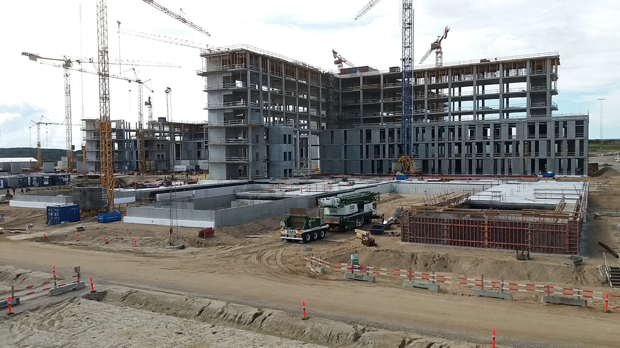 Den nordøstlige del at byggeriet med ambulatorier i forgrunden og sengetårne i næste fuld højde i baggrunden. Fotograferet under åbent hus.